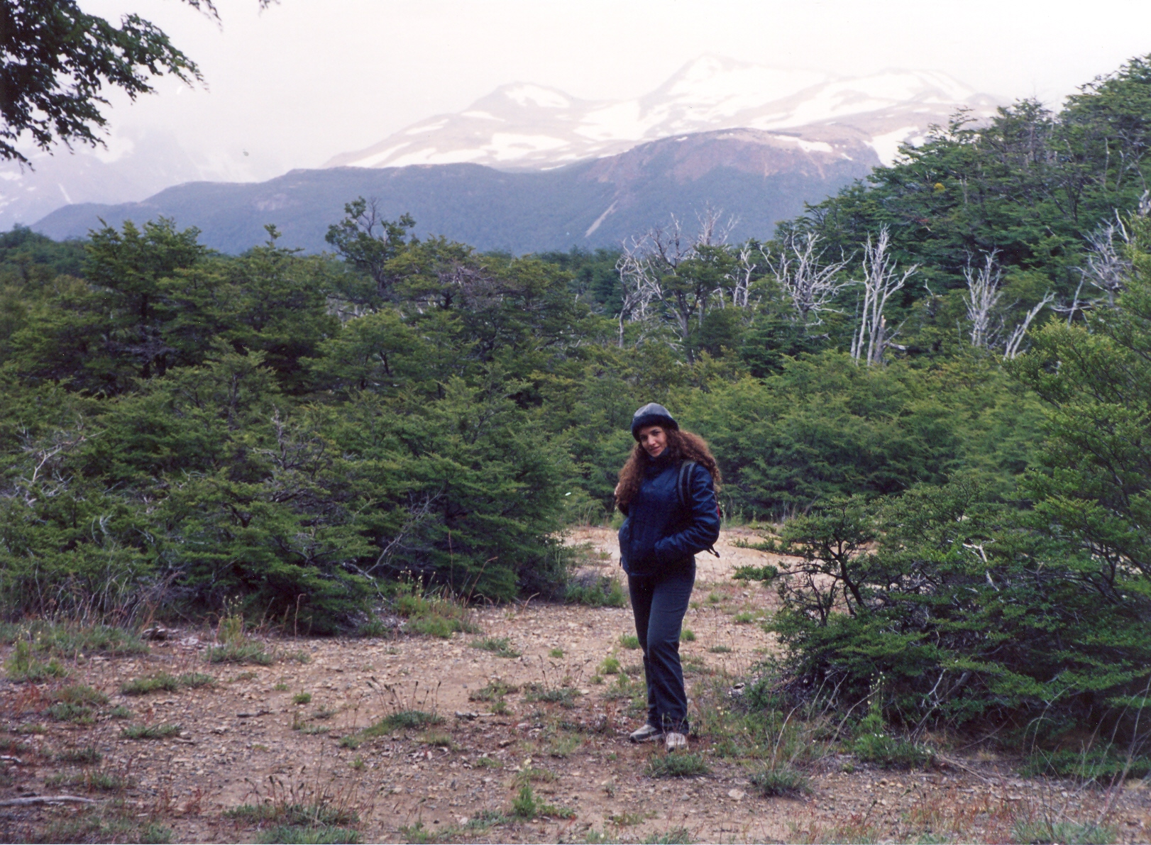 Pueblo Brondo, Alto Río Senguer